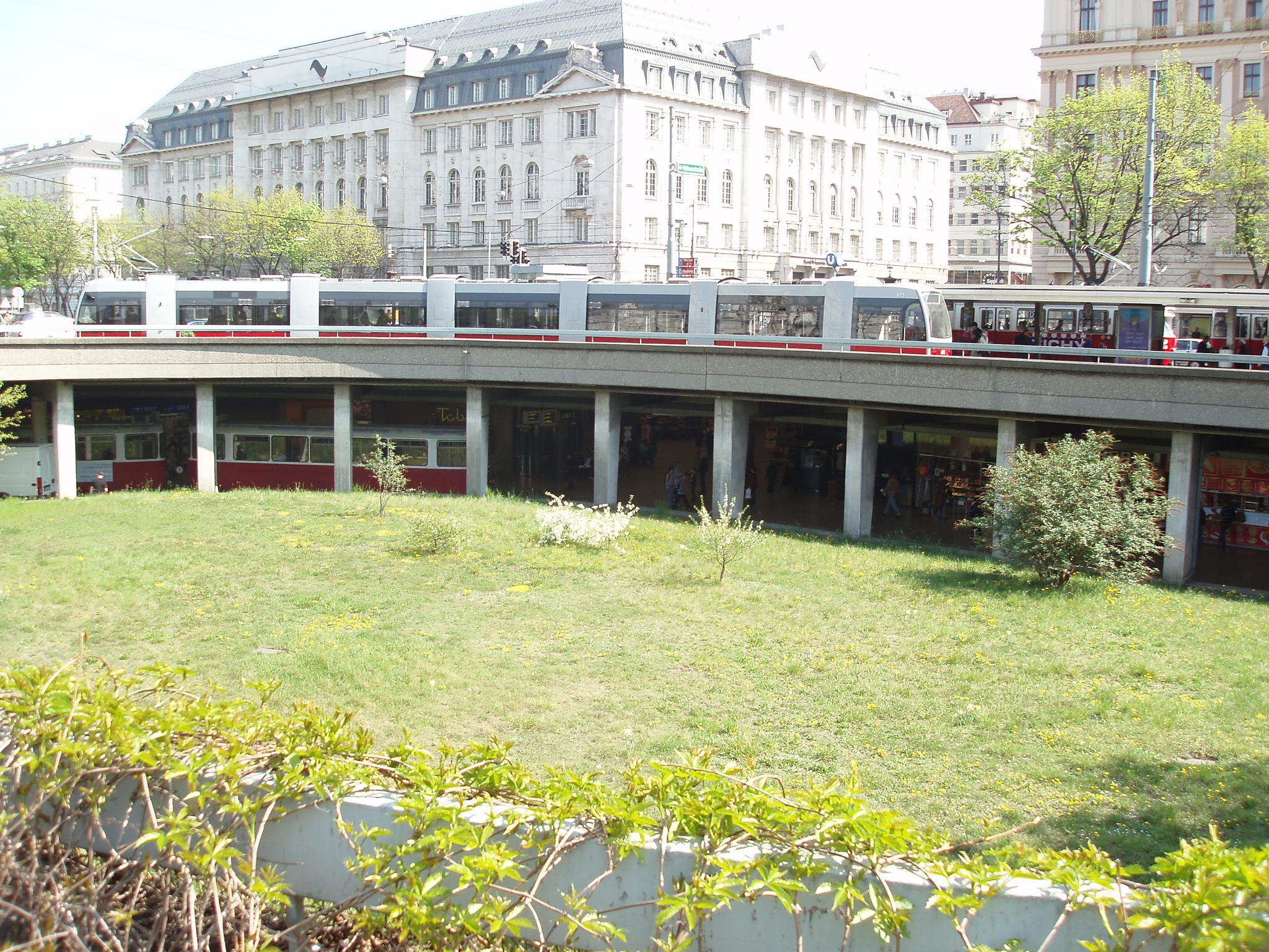 Straßenbahnen bei der Station Schottentor, im Vordergrund das "Jonasreindl"